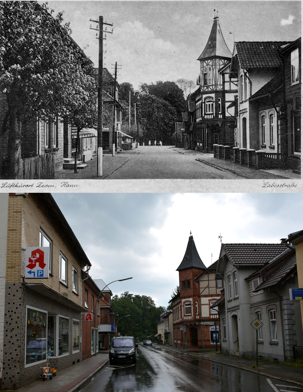 Labesstraße in Zeven